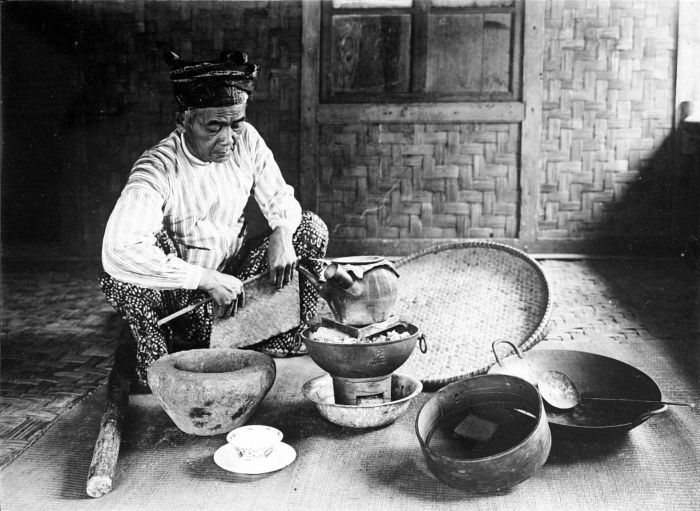 Repronegatief. Een dukun (medicijman) bereid een drank